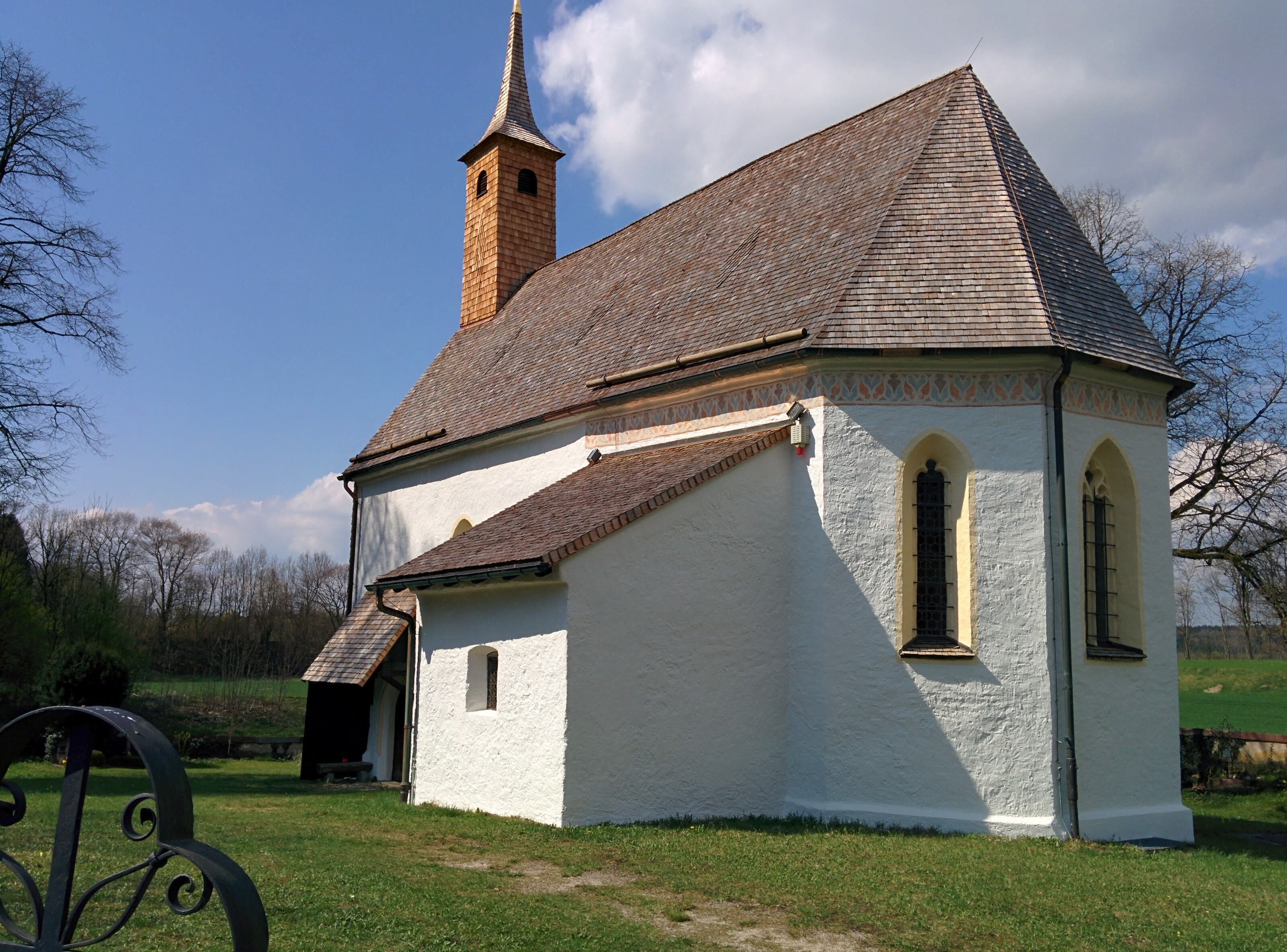 St. Johann Baptist, Steinheilstraße 11, Stöttham bei Chieming